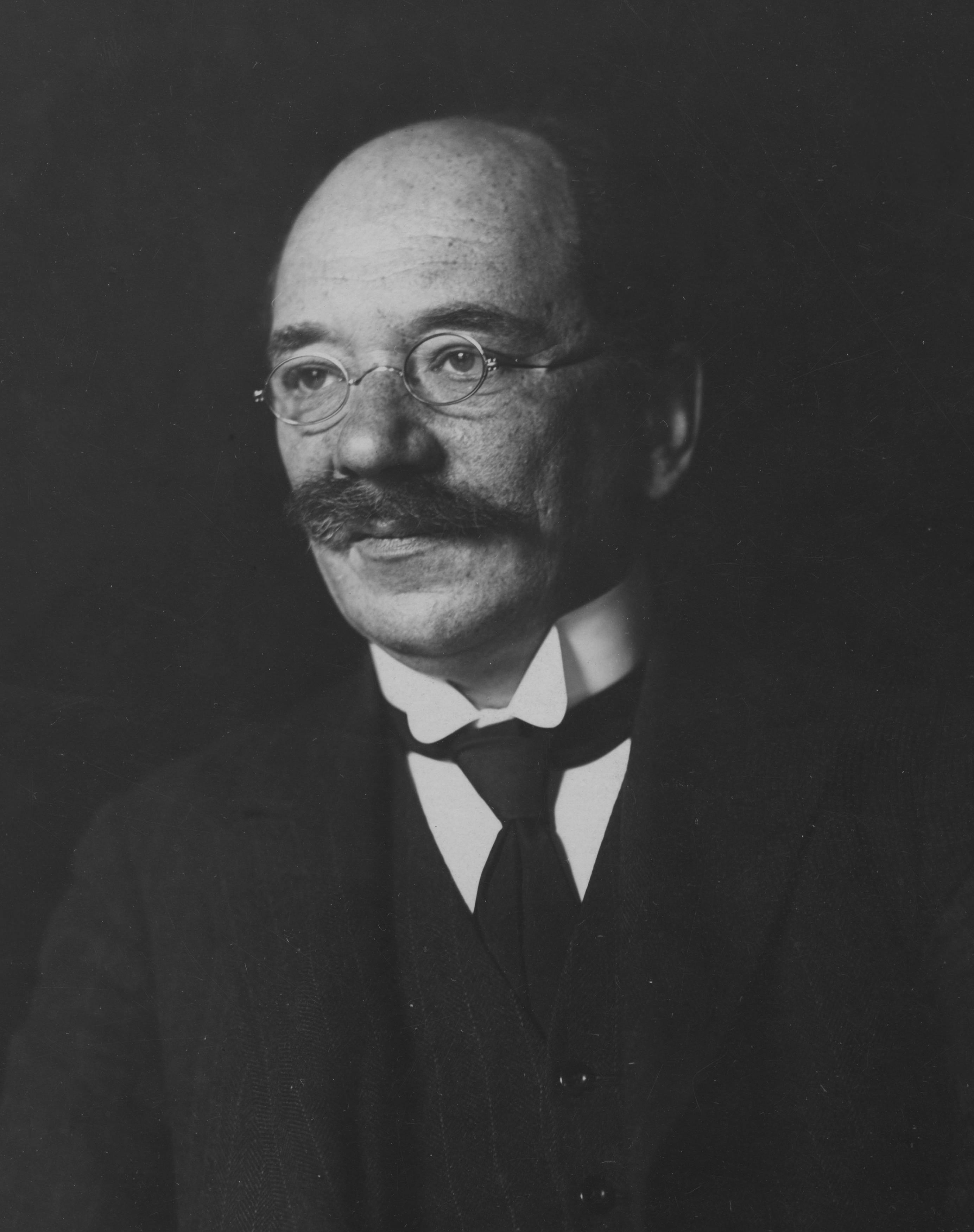 Станислав Кутшеба, полски историк на правото.